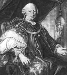 Johann Philipp Graf Cobenzl